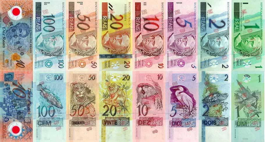 A brazil reál első, 1994-es címletsora a 2000-ben kibocsájtott Pedro Álvares Cabral-t ábrázoló emlék polimer 10 reálossal. A 2 és a 20 reálos címletekkel csak 2001-2002-ben egészítették ki a szériát.